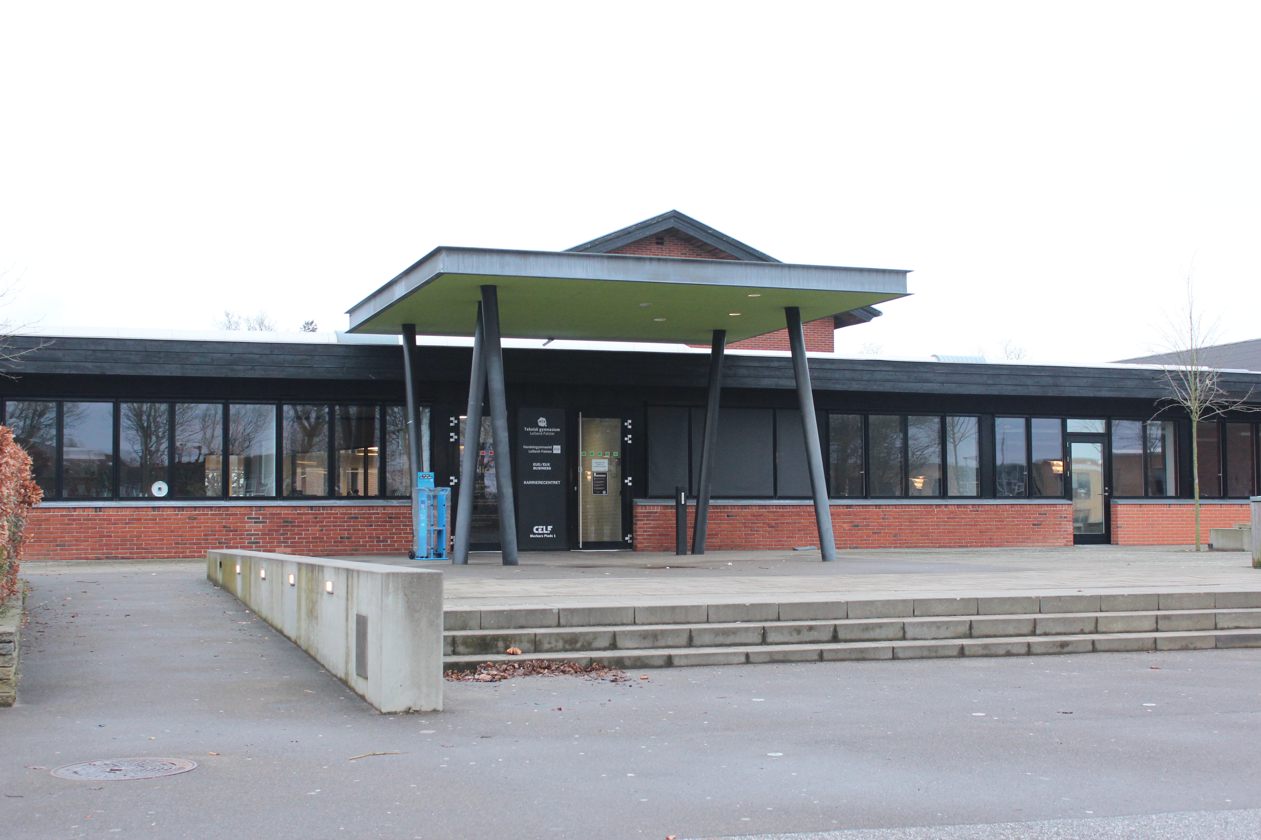 Indgangen til CELF på Merkurs Plads. Tilbyder HTX, HHX, HG og flere erhvervsuddannelser.